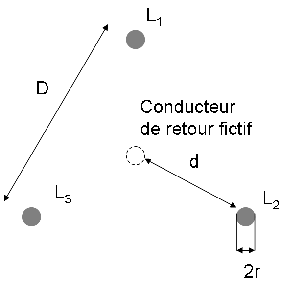 Système triphasé avec lignes de retour fictive